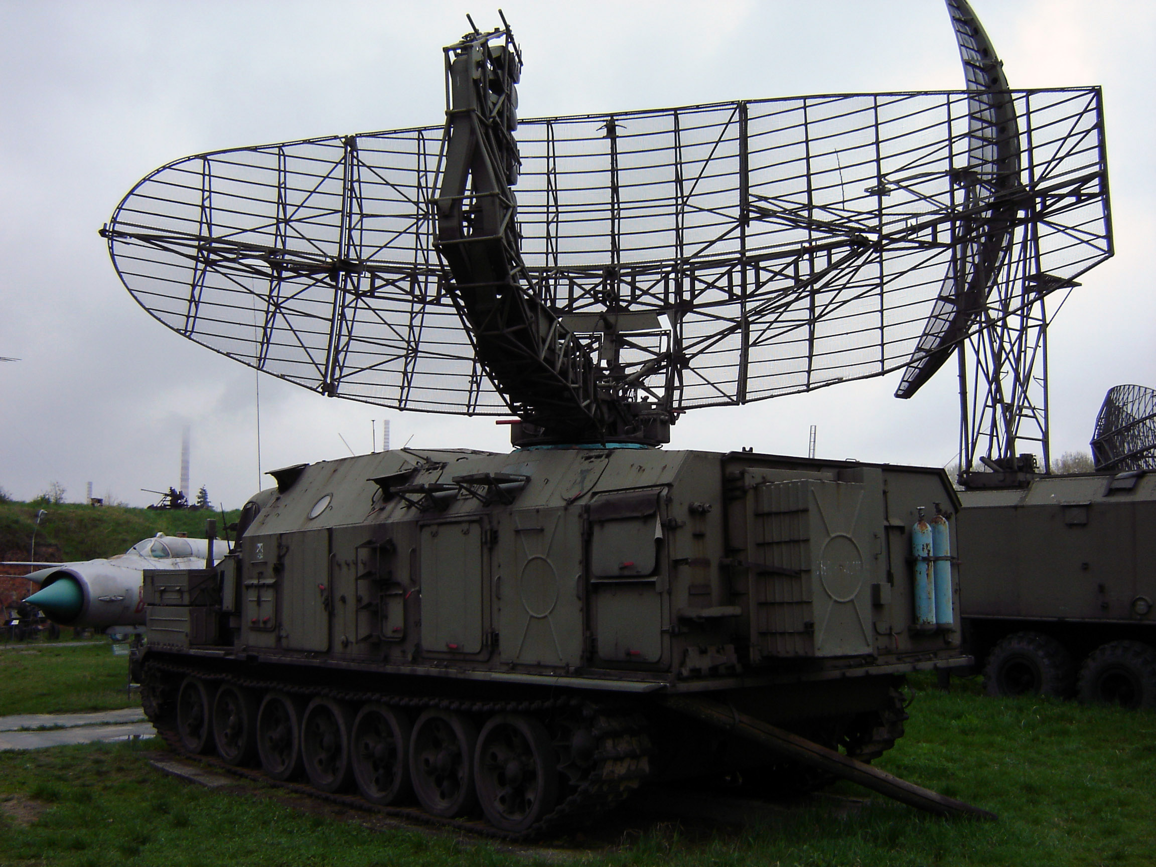 Stacja Radiolokacyjna; P-40, NATO-Code "Long Track"